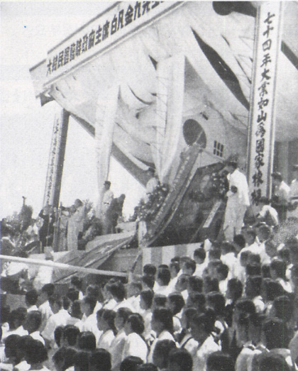 Baikbum Kim Gu Funeral, Dongdaemun Gongsul undongjang in Seoul, 1949.07.05